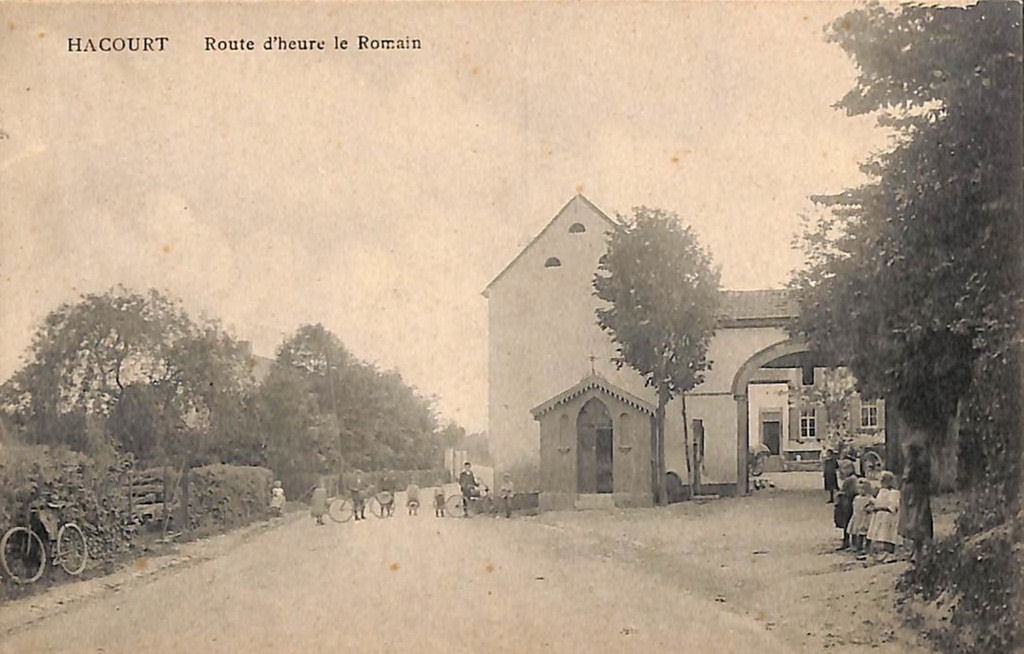 Carte postale du village vers 1910.